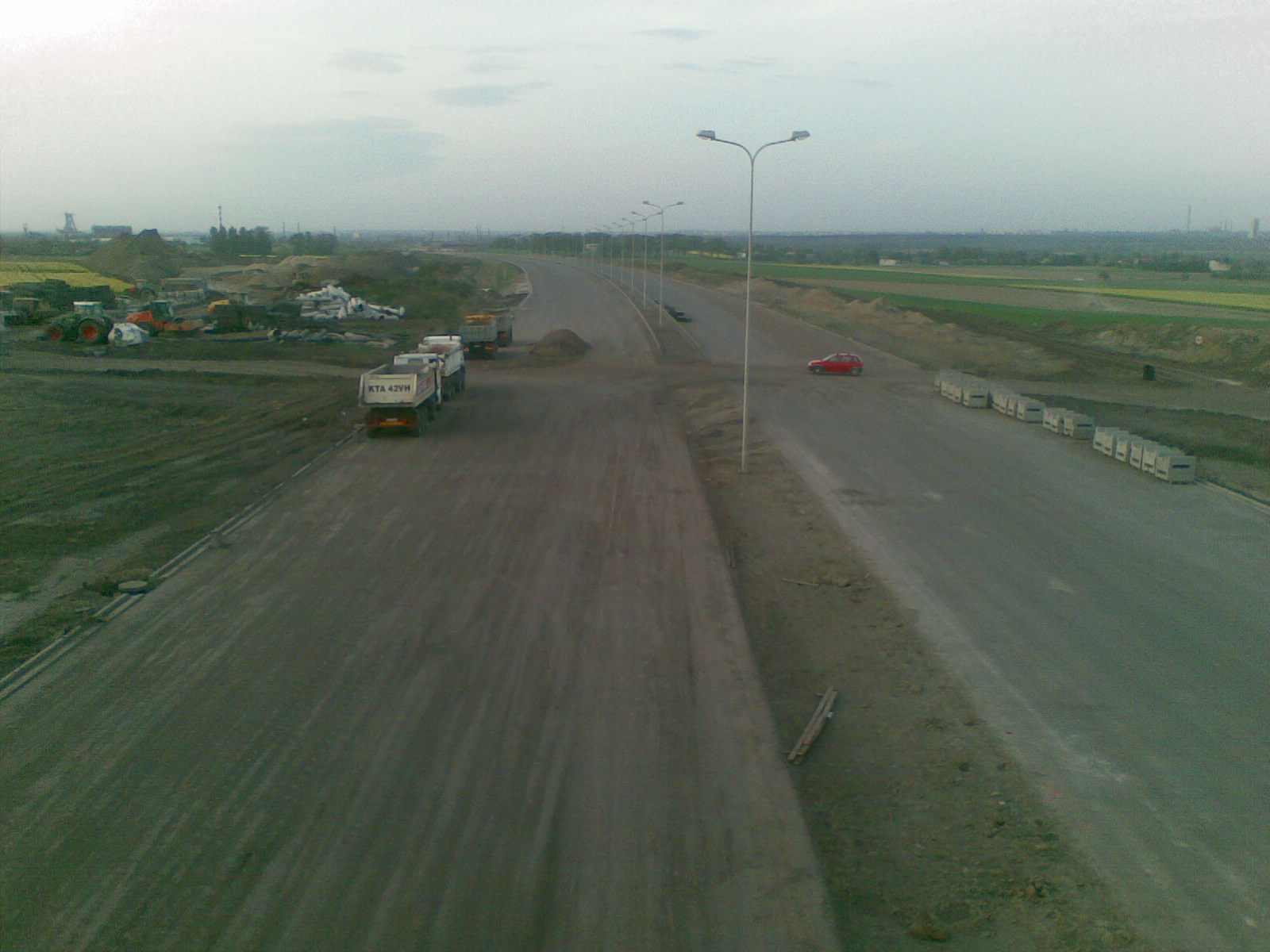 Widok Autostrady A1 odcinek Sośnica-Bełk w budowie w okolicy Bojkowa.Widok z wiaduktu ulicy Bojkowskiej nad A1 w kierunku Przyszowic